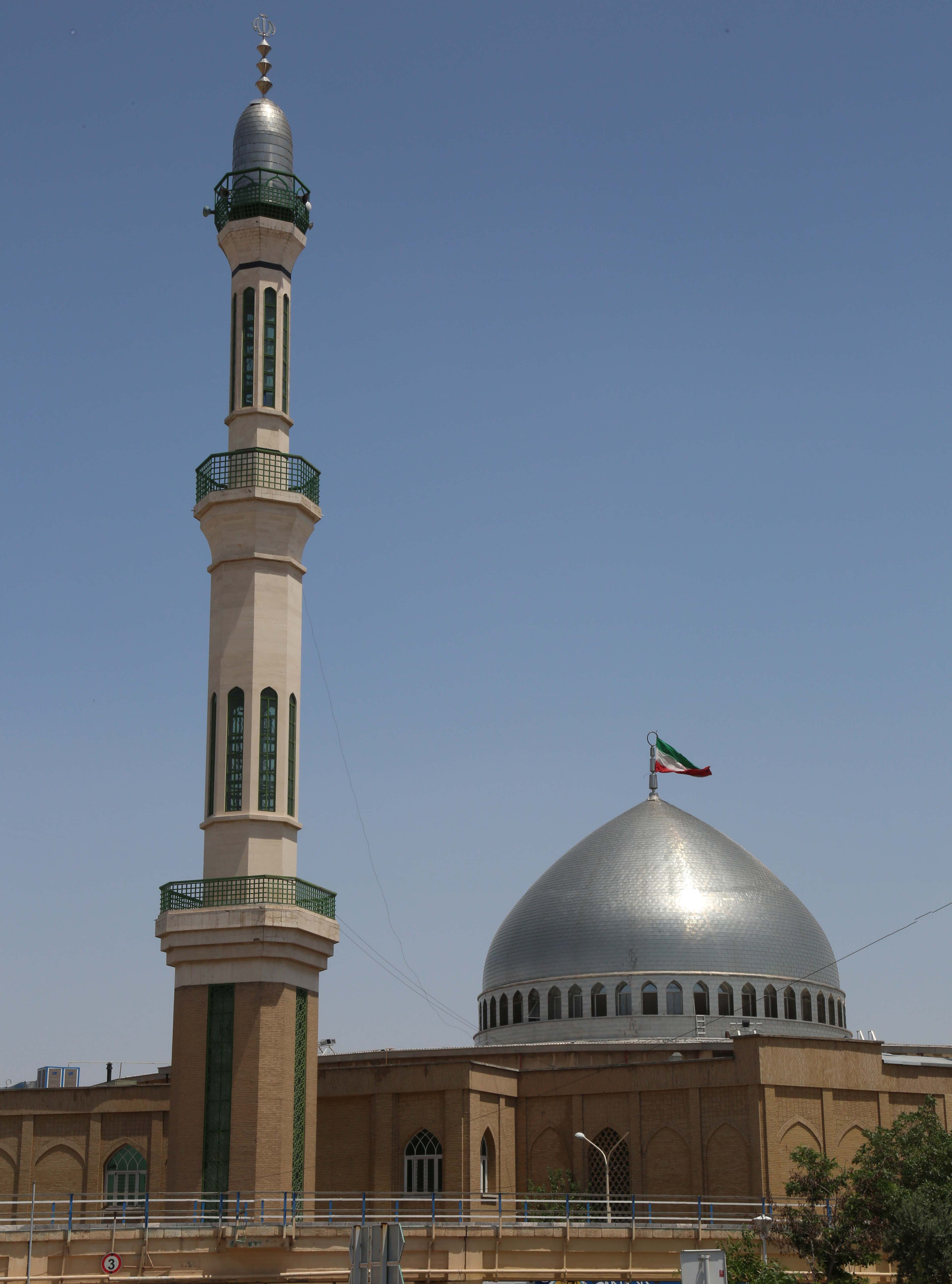 نمایی از مصلای قدس قم